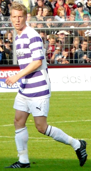 Henning Grieneisen, VfL Osnabrück